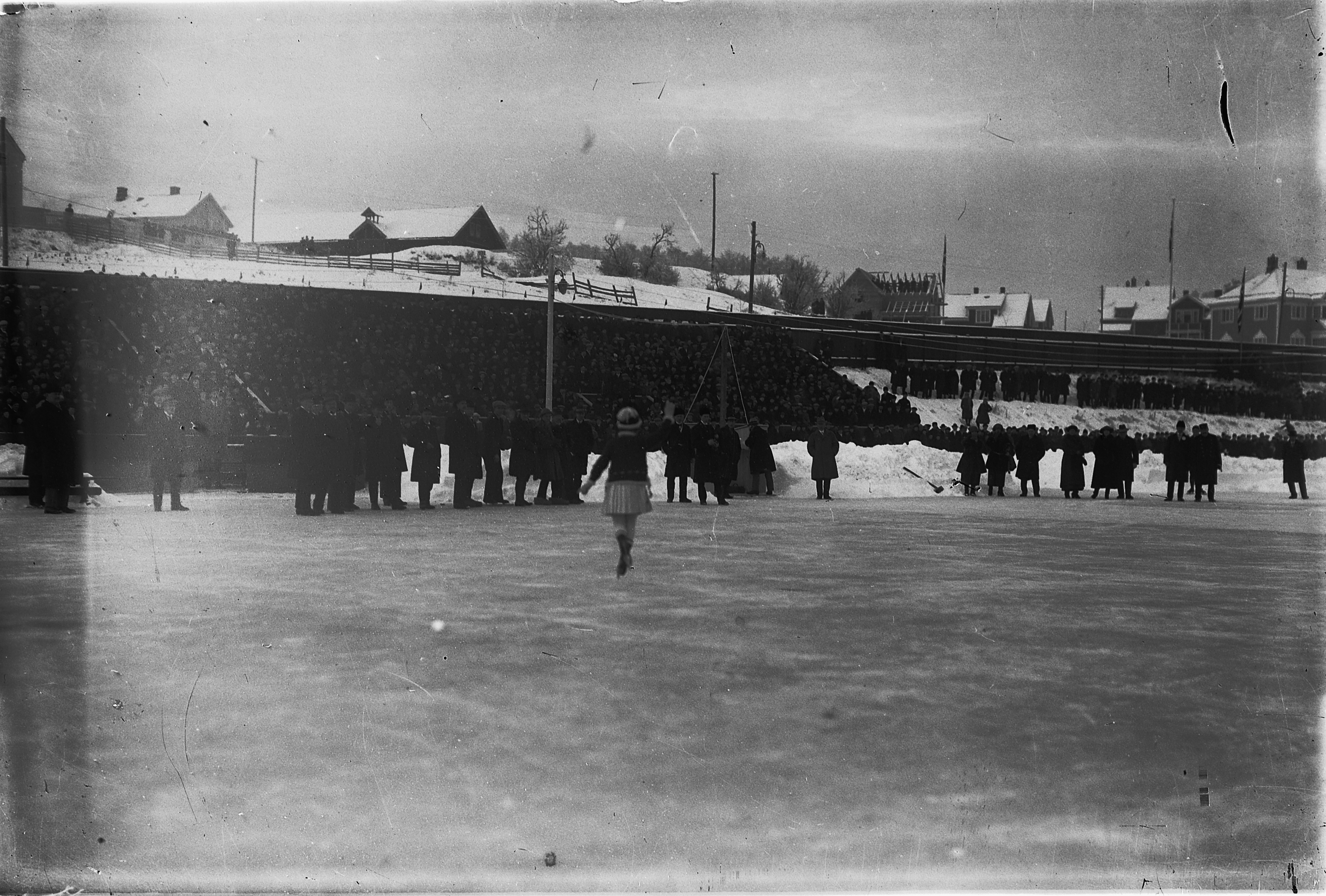 Europamesterskapet på skøyter på Hamar 1934. Sonja Henie underholder i pausen.